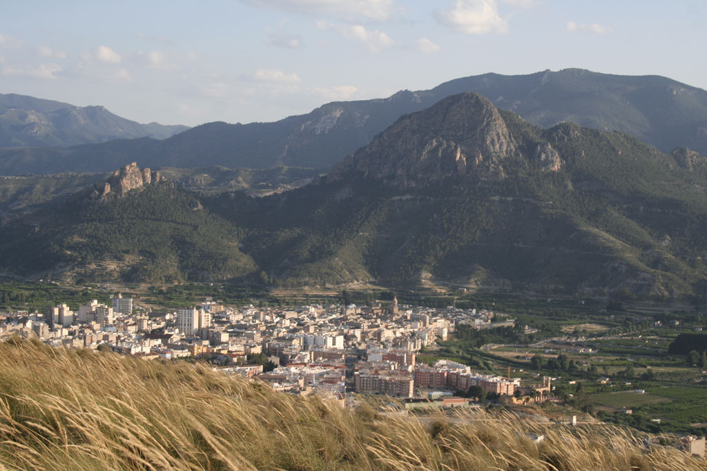 Cieza desde la sierra de Ascoy.